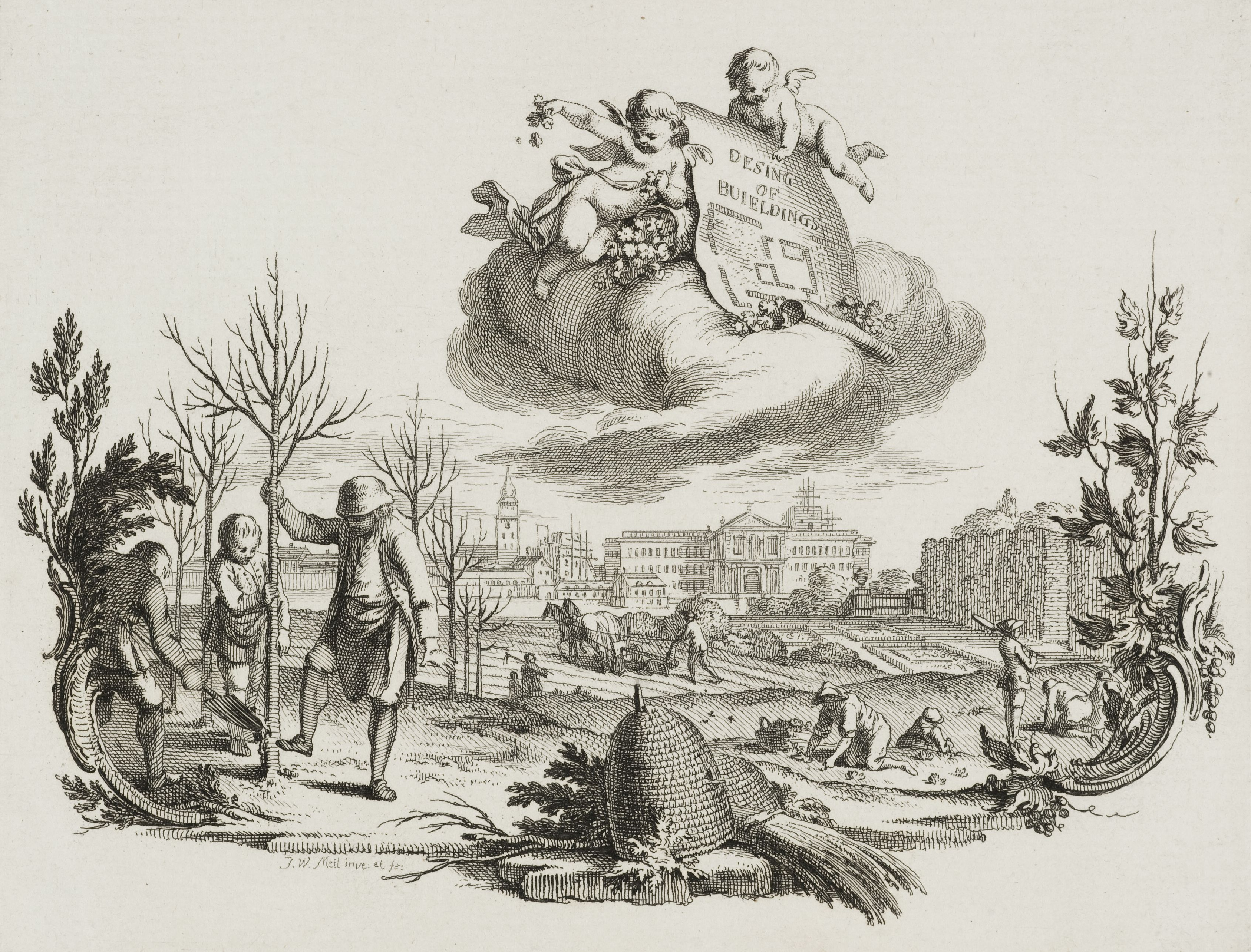 Ansicht der Stadt Dessau mit Feld- und Gartenarbeit im Vordergrund